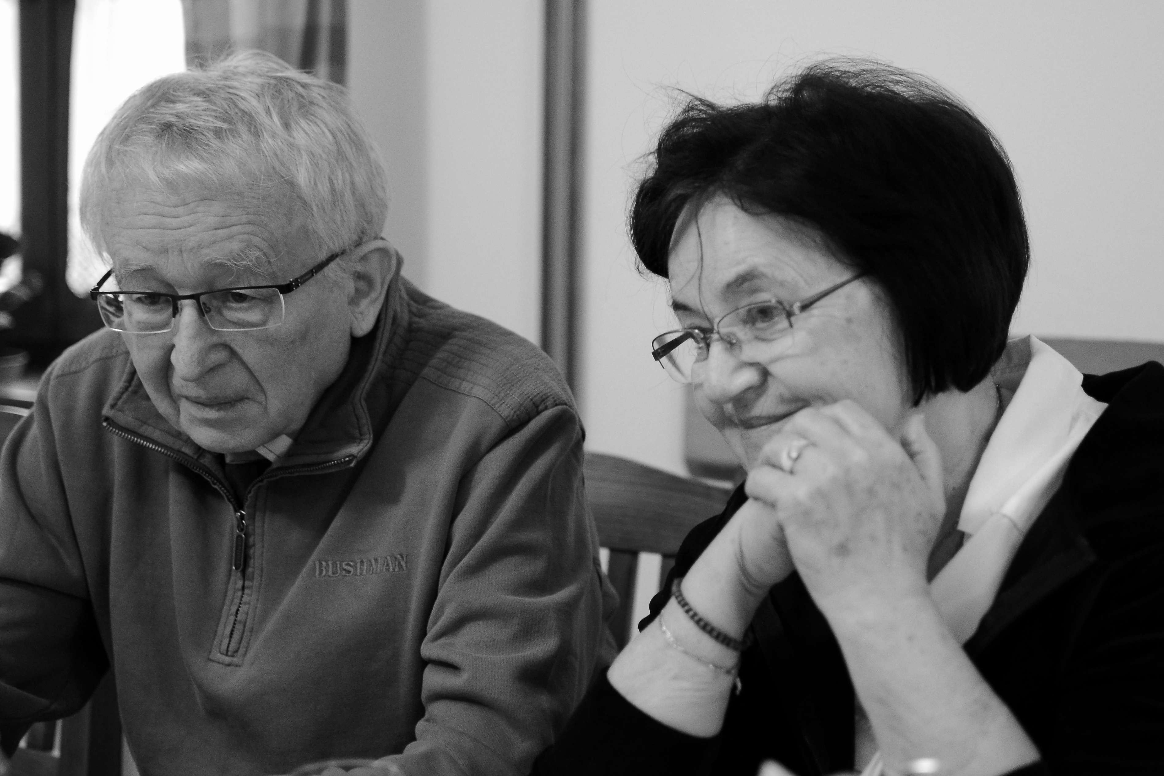 Václav Šorel a jeho žena na oslavě narozenin jejich dcery.